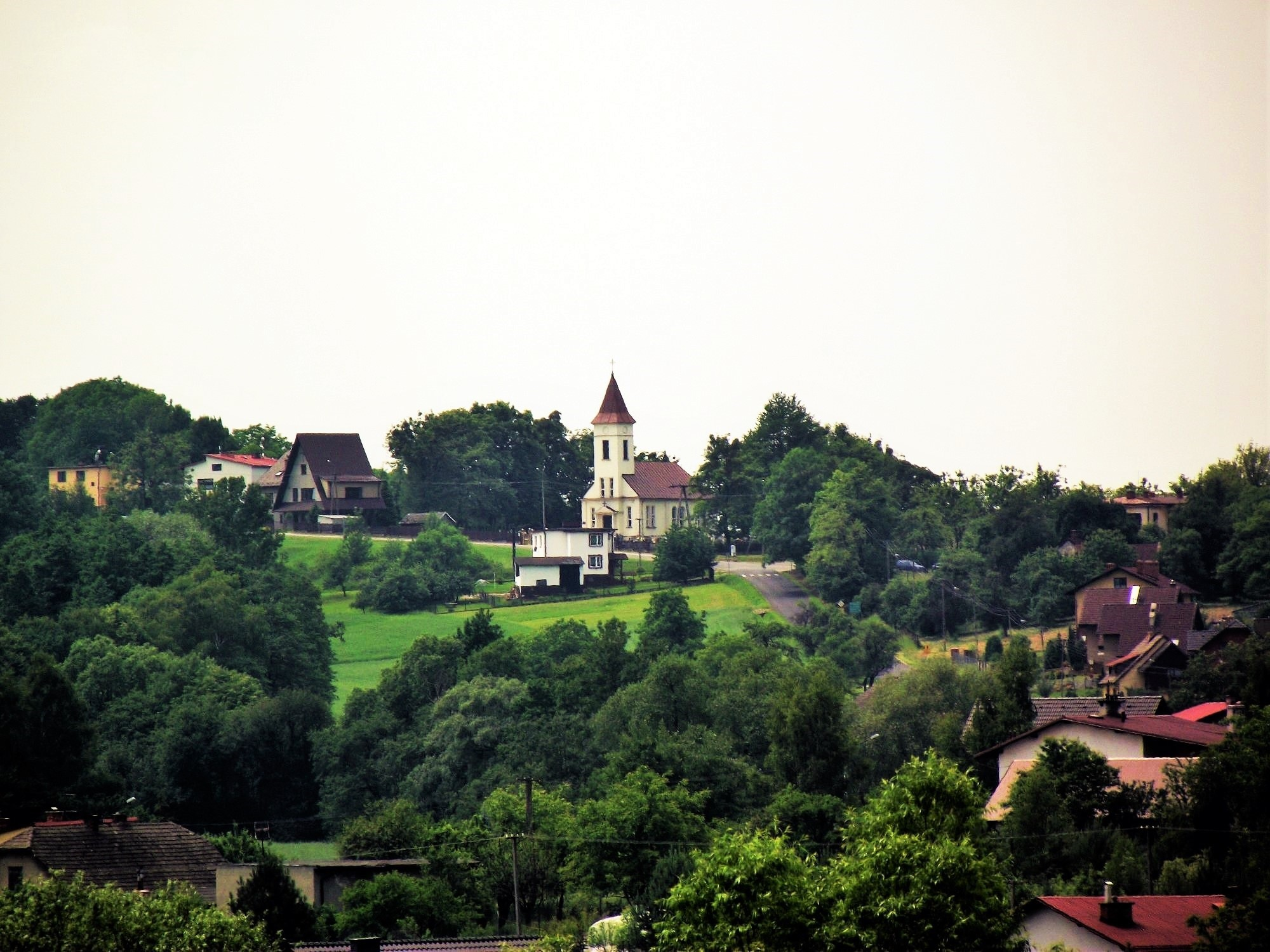 Pohled na kostel ve Věščútu.